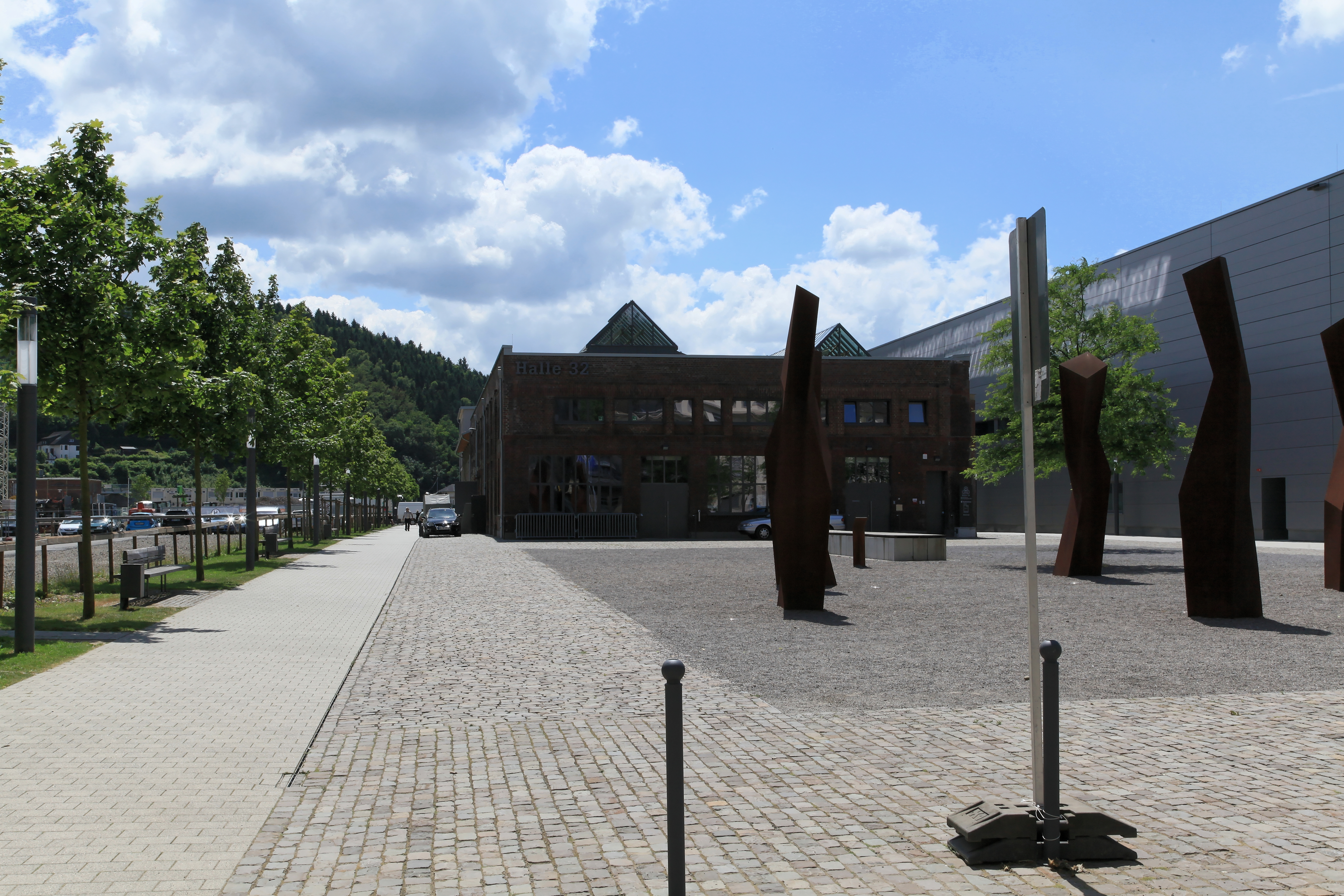 "Bürger im Gespräch" von Jan Frank Demeulemeester vor Halle 32, Steinmüllerallee in Gummersbach